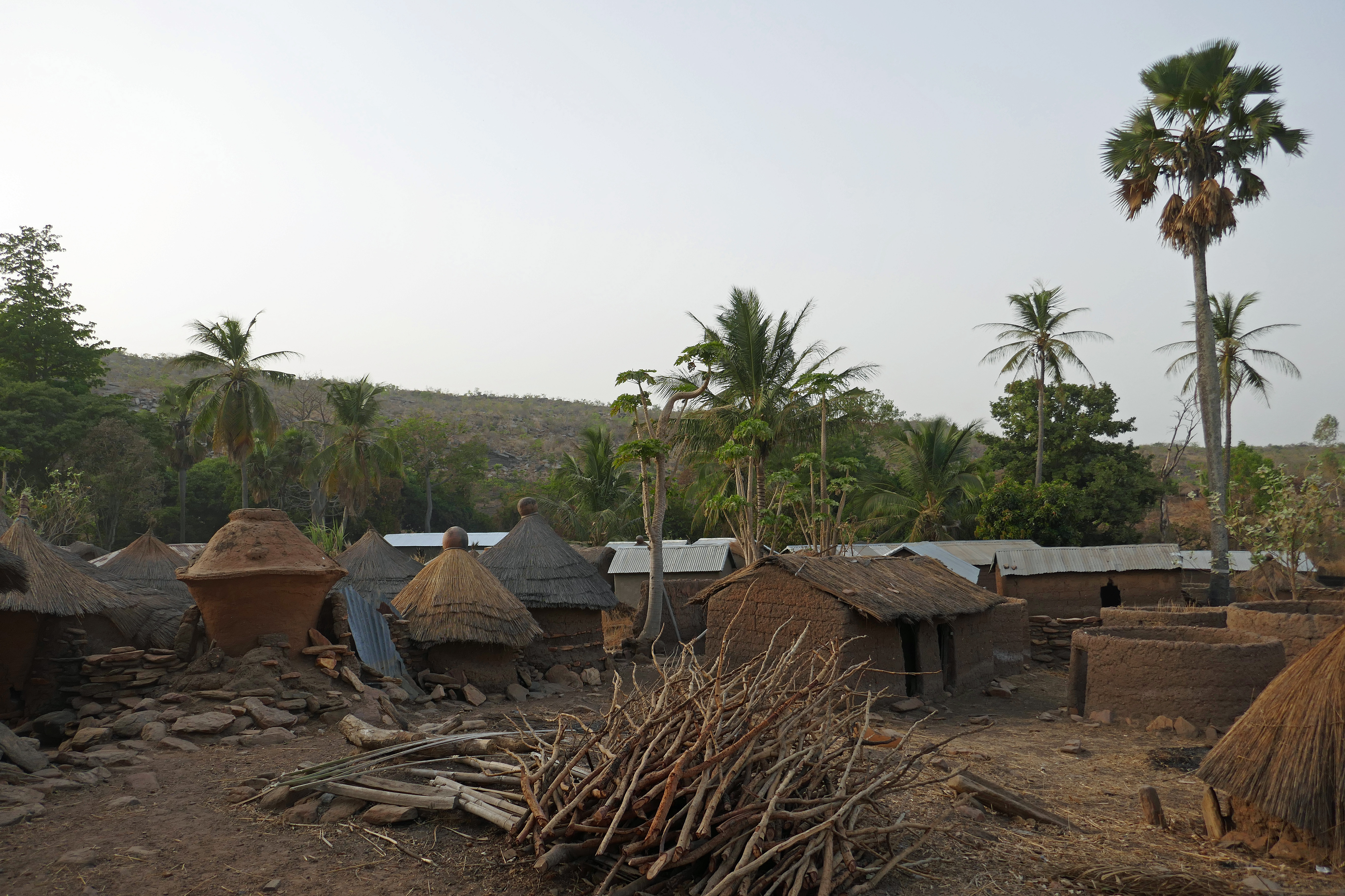 Le village de Tanéka-Béri (commune de Copargo) au Bénin.